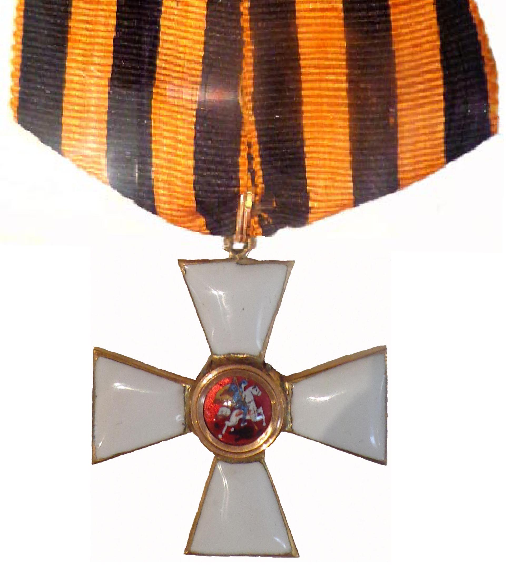 Musée de la Légion d'honneur, Paris.